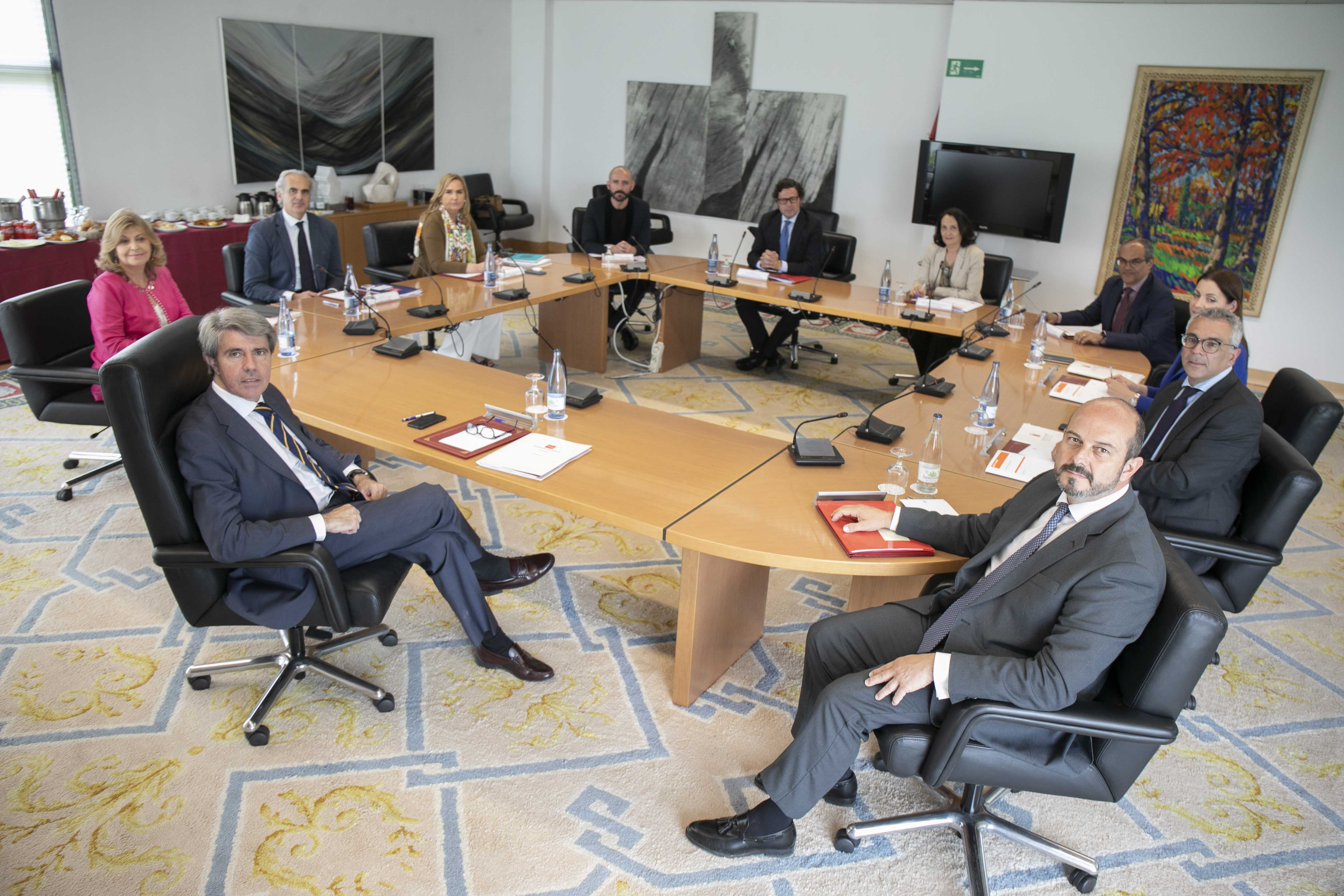 Réunion extraordinaire du Conseil de gouvernement présidé par Ángel Garrido.